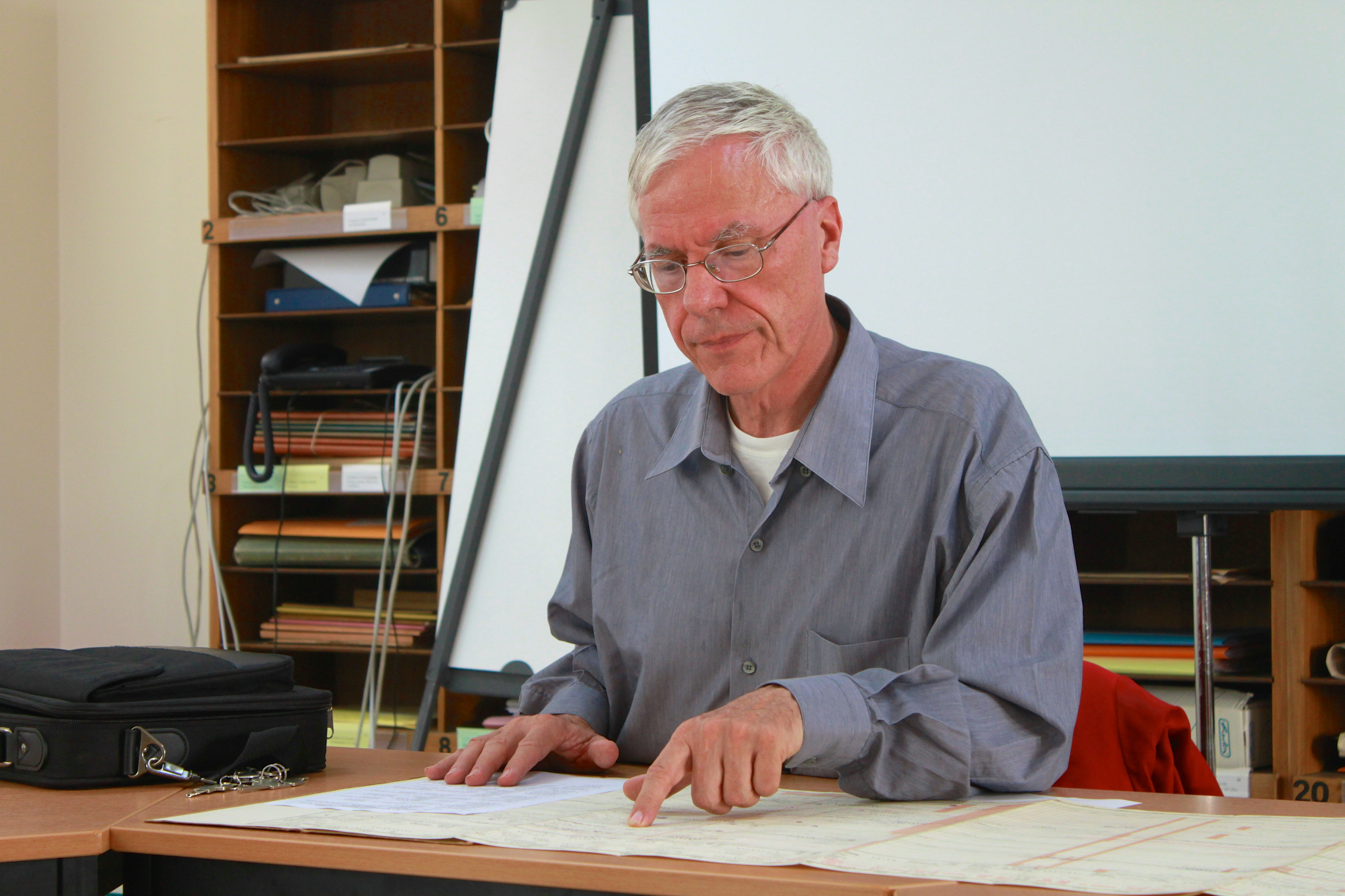 P. Bertrand Meunier SJ im Konferenzraum der Sources Chrétiennes in Lyon